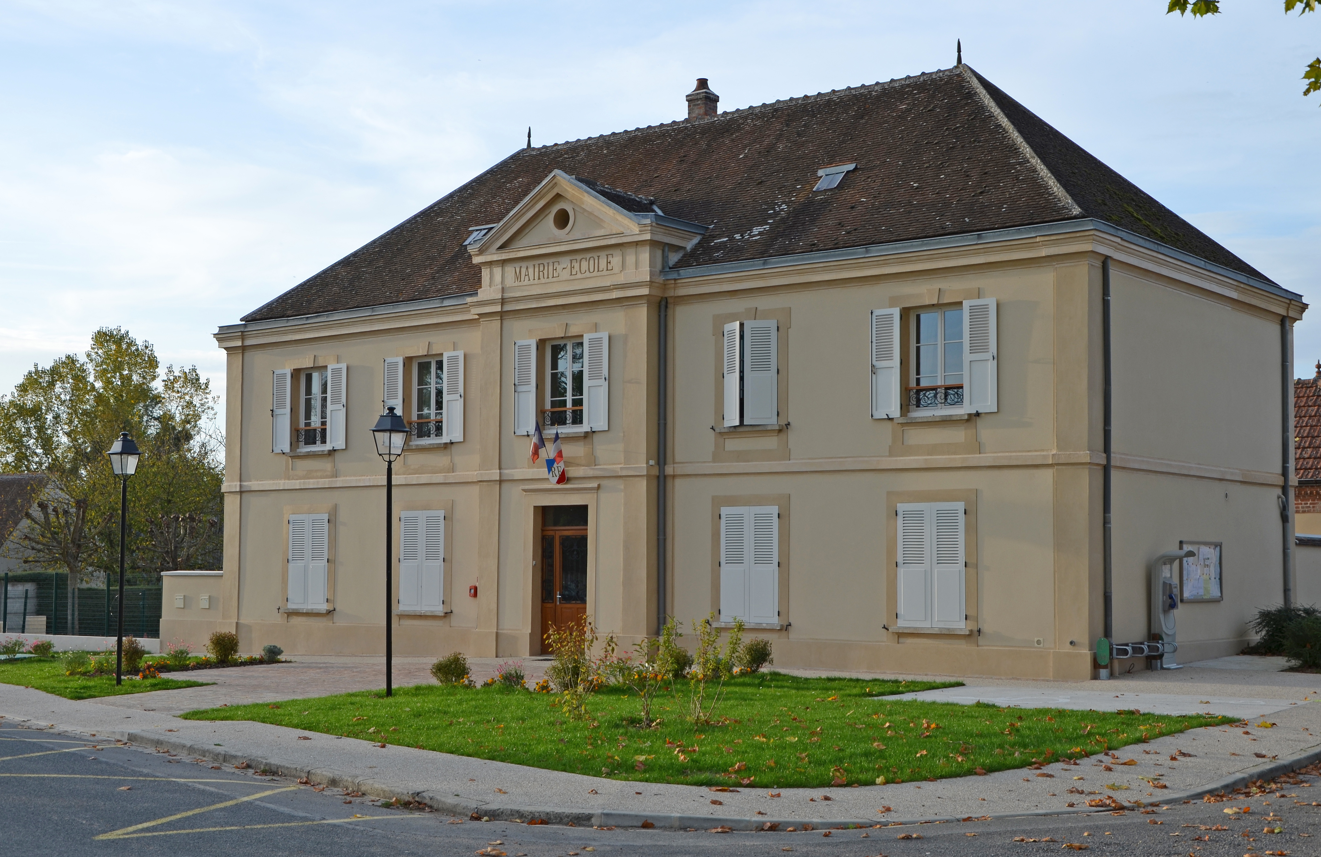 Mairie de Jaulnes, Seine-et-Marne, Ile de France, France